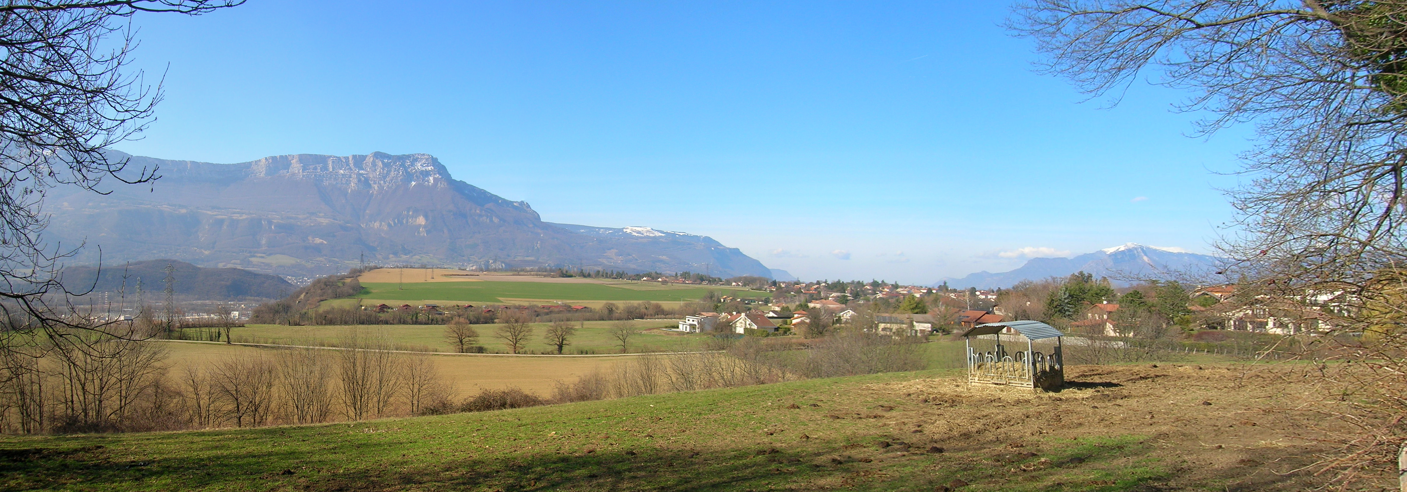 Champagnier, Isère, AuRA, France.